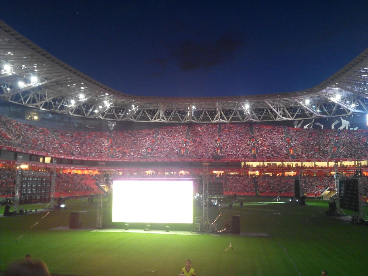 Final Copa del Rey 2015